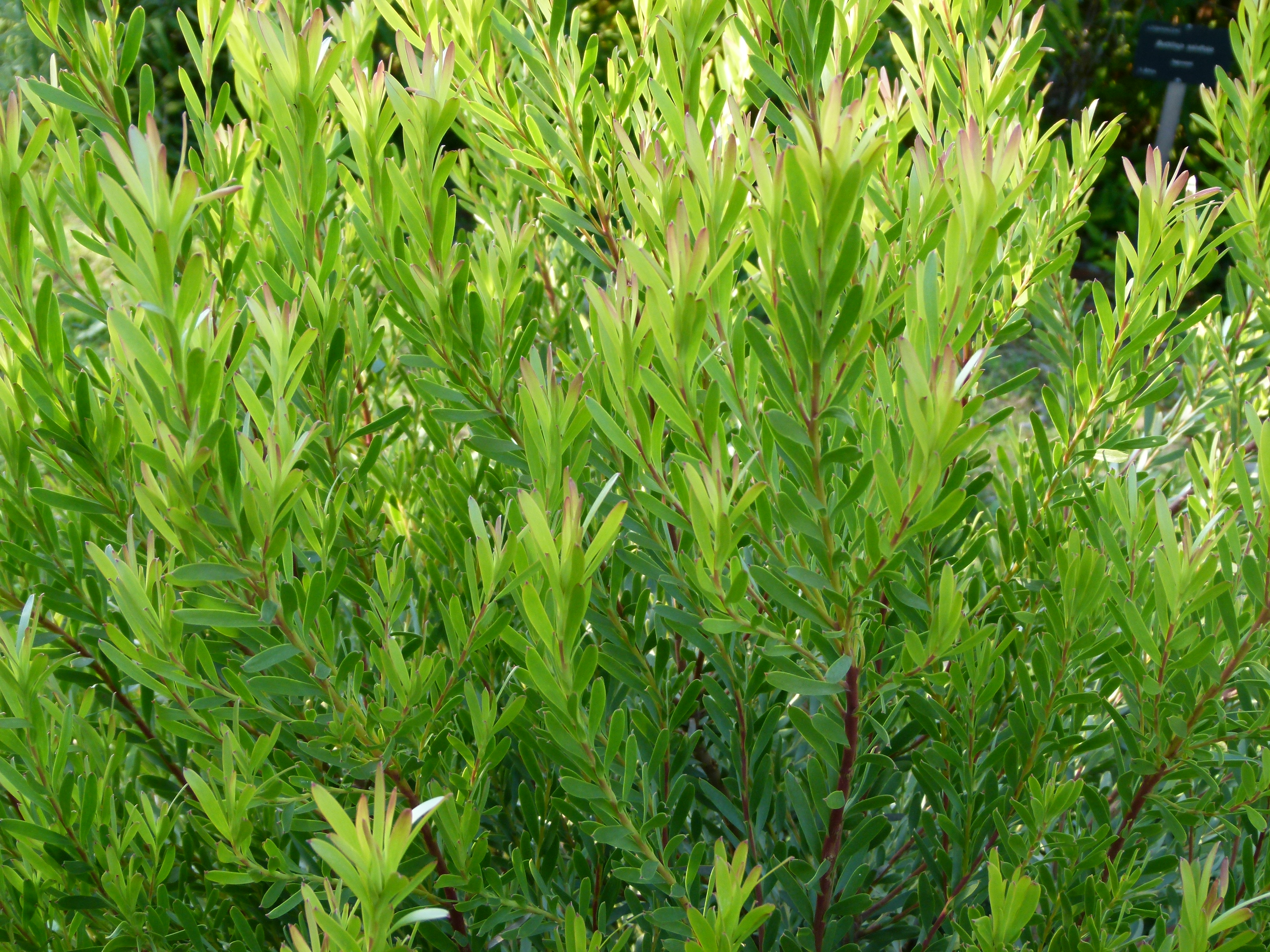 Jardin botanique Barcelone